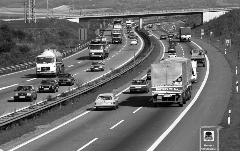 Autobahn - A 61 Starker Reiseverkehr zwischen Mendig und Plaidt